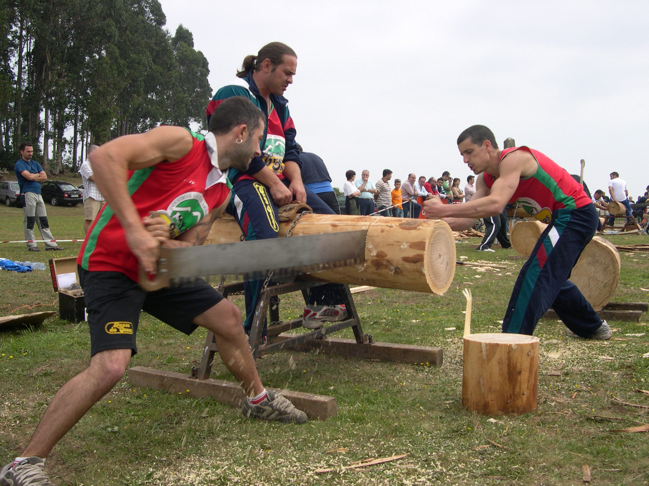 Corta tueros, deporte tradicional asturianu